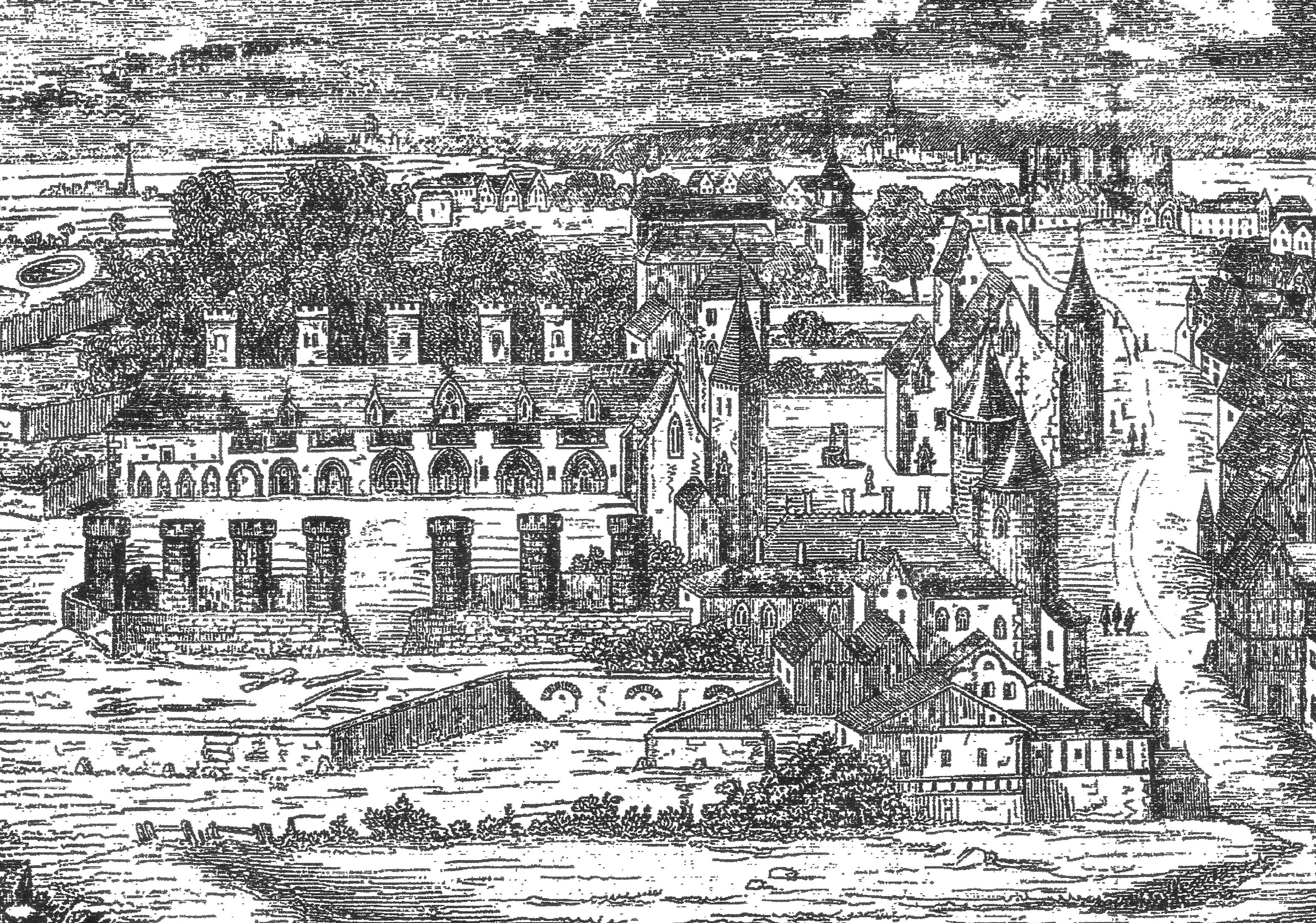 Vue d'ensemble de l'Hôtel des Tournelles d'après un dessin d'époque (1550).